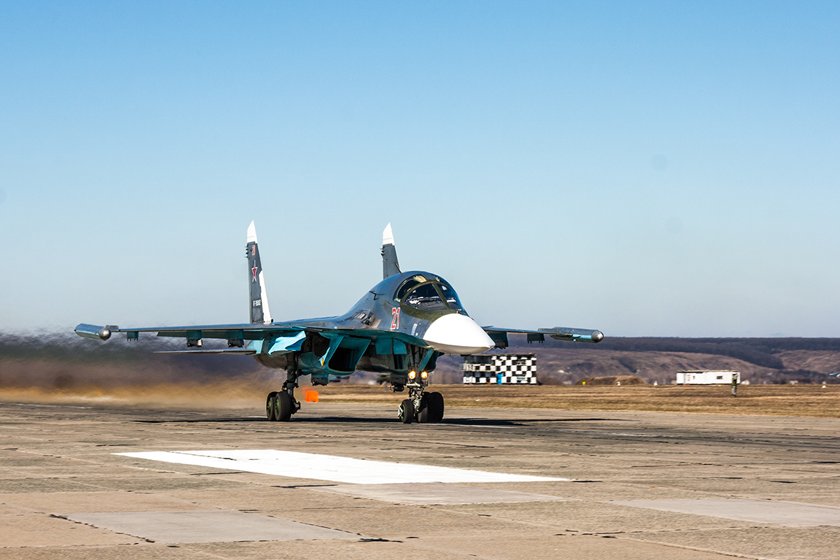 Практическое бомбометание экипажей Су-34 Западного военного округа в ходе ЛТУ